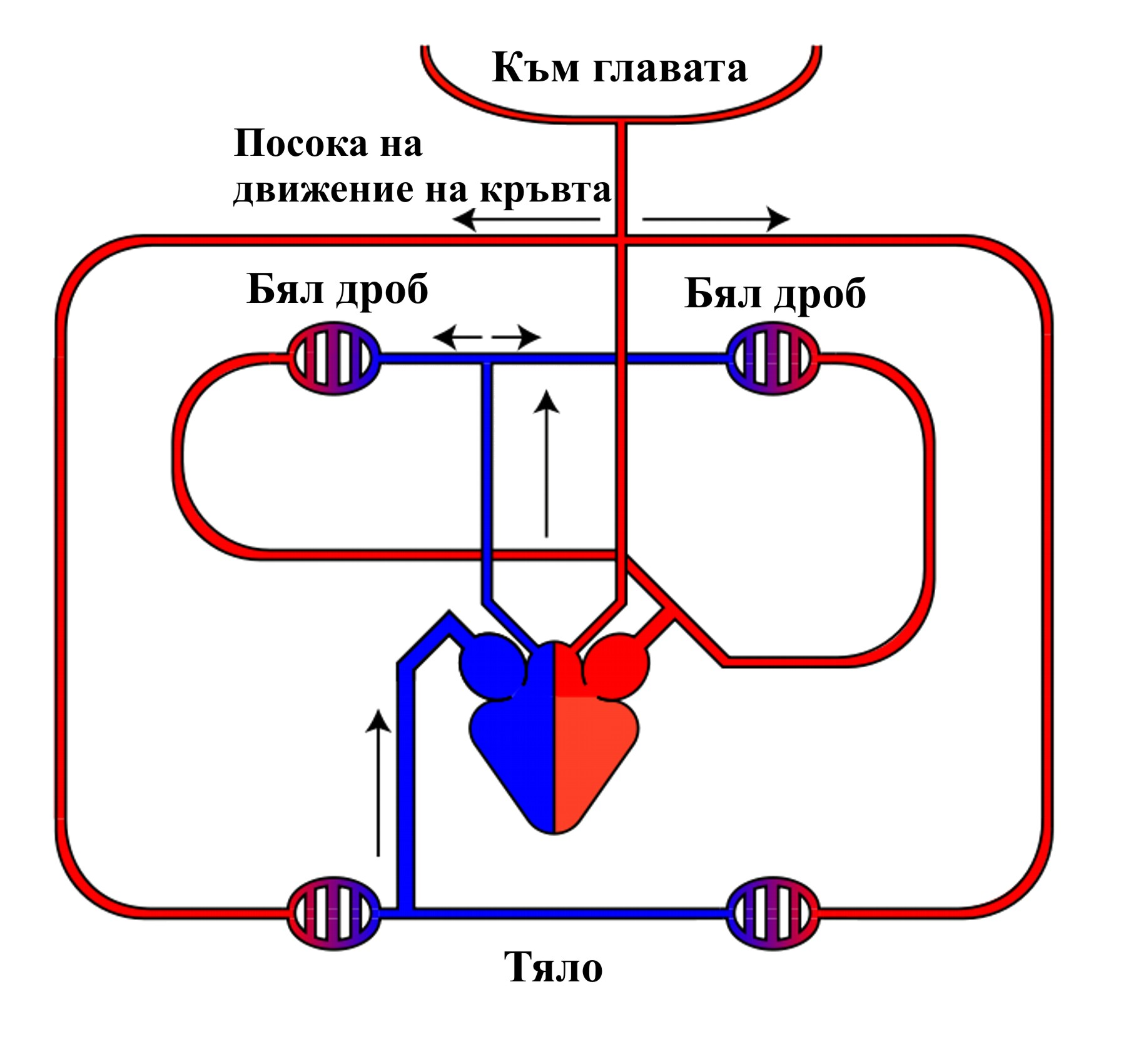 Опростено представяне на кръвоносната система при топлокръвните, червено обозначава окислената кръв, а синьото неокислената. Изображението е съставено на Adobe Illustrator 10 от User:Lennert B на 26.11.05 под името Image:Blutkreislauf_Gleichwarme.svg и преведено на български от User:Azimski на 28.04.07